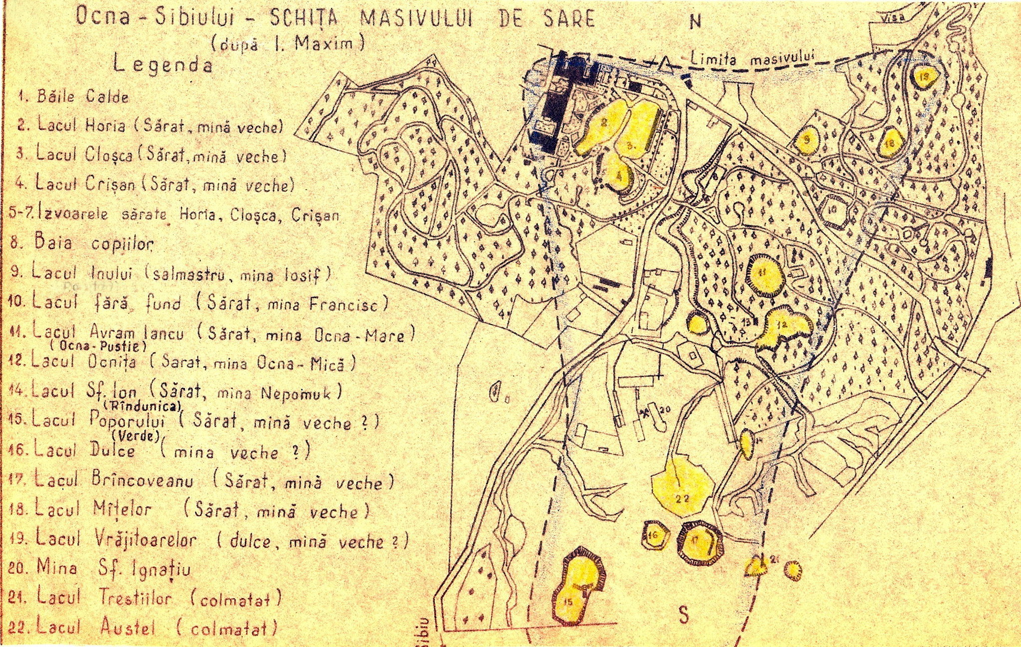 Salzlagerstätte Ocna Sibiului (Lageplan nach Ion Maxim, 1930)